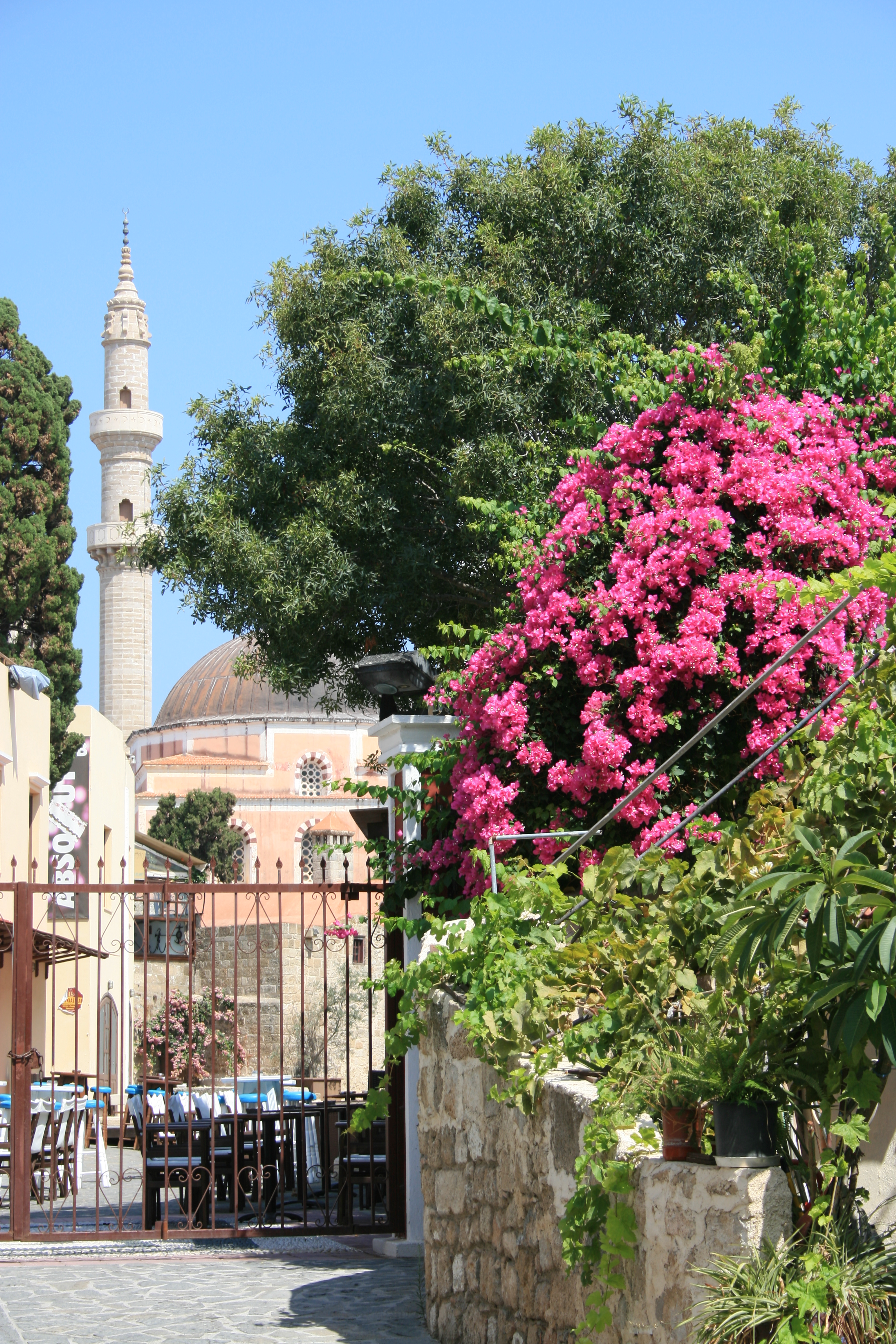 Sueleiman-Moschee Rhodos